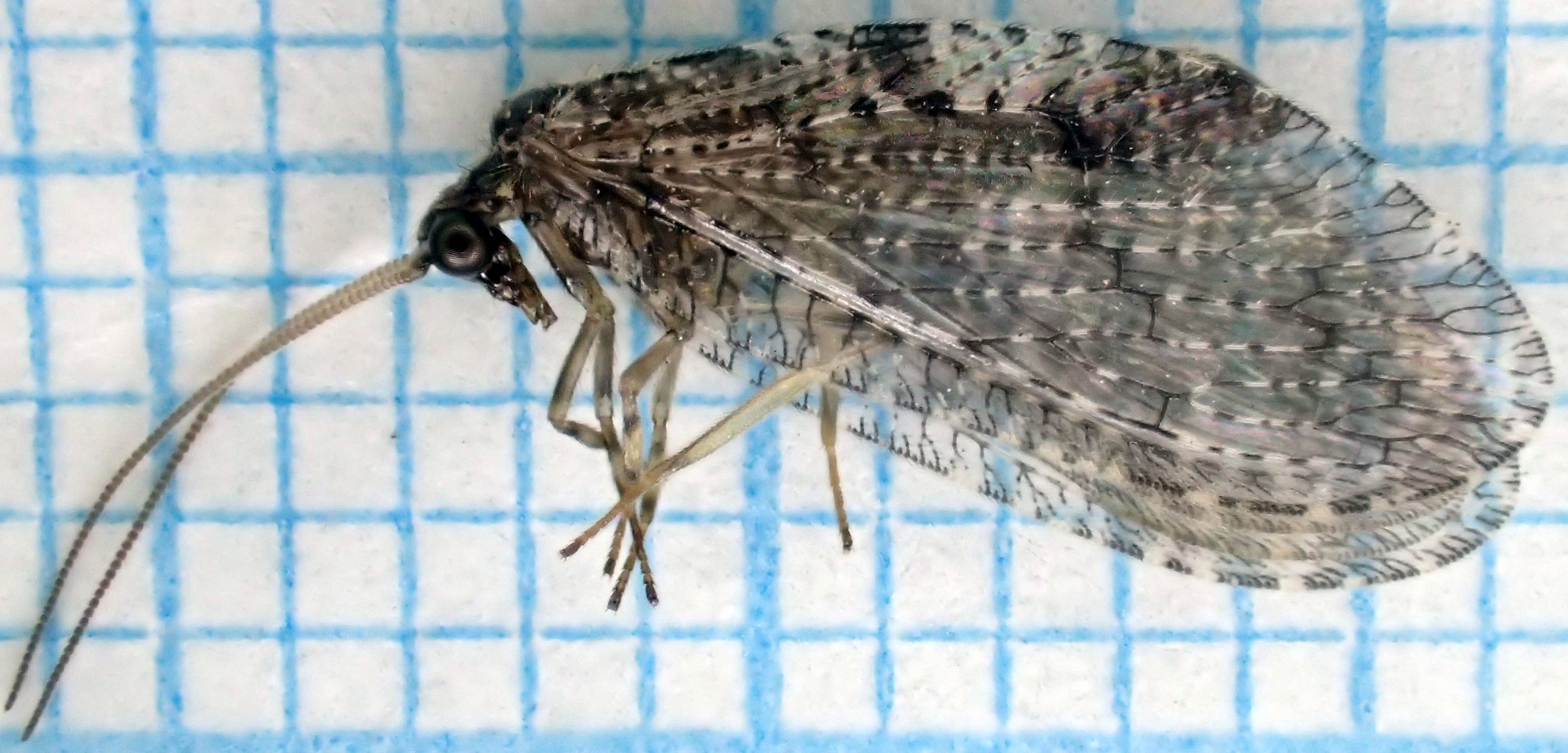 nervebladlusløve